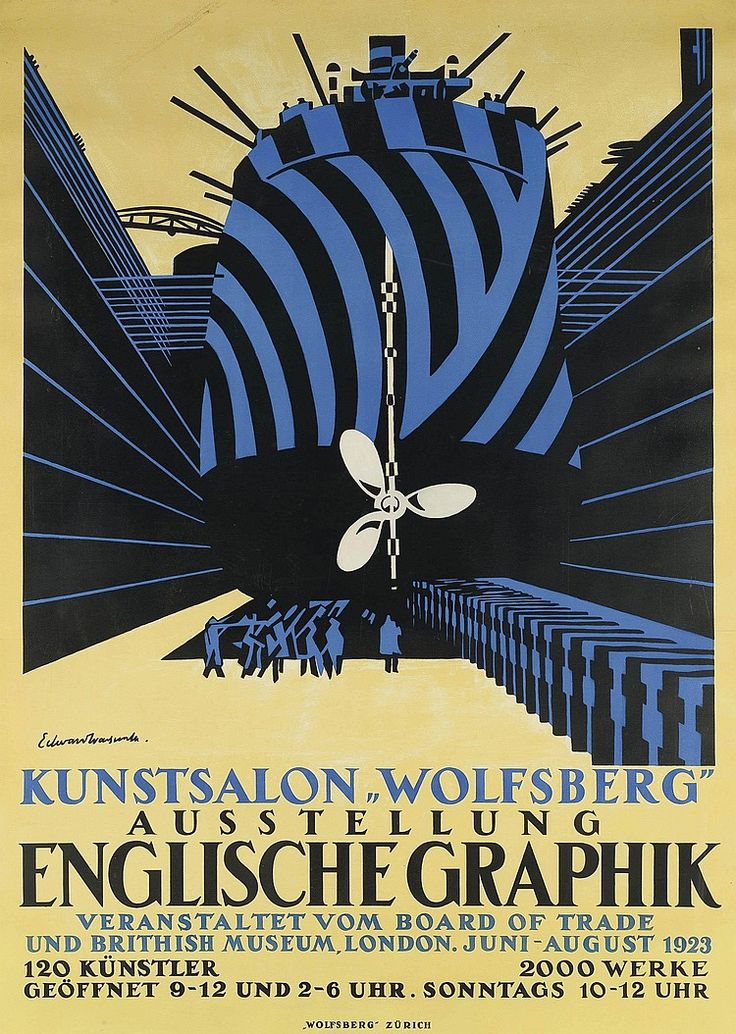 Englische Graphik im Kunstsalon Wolfsberg, Zürich. Plakat von Edward Wadsworth